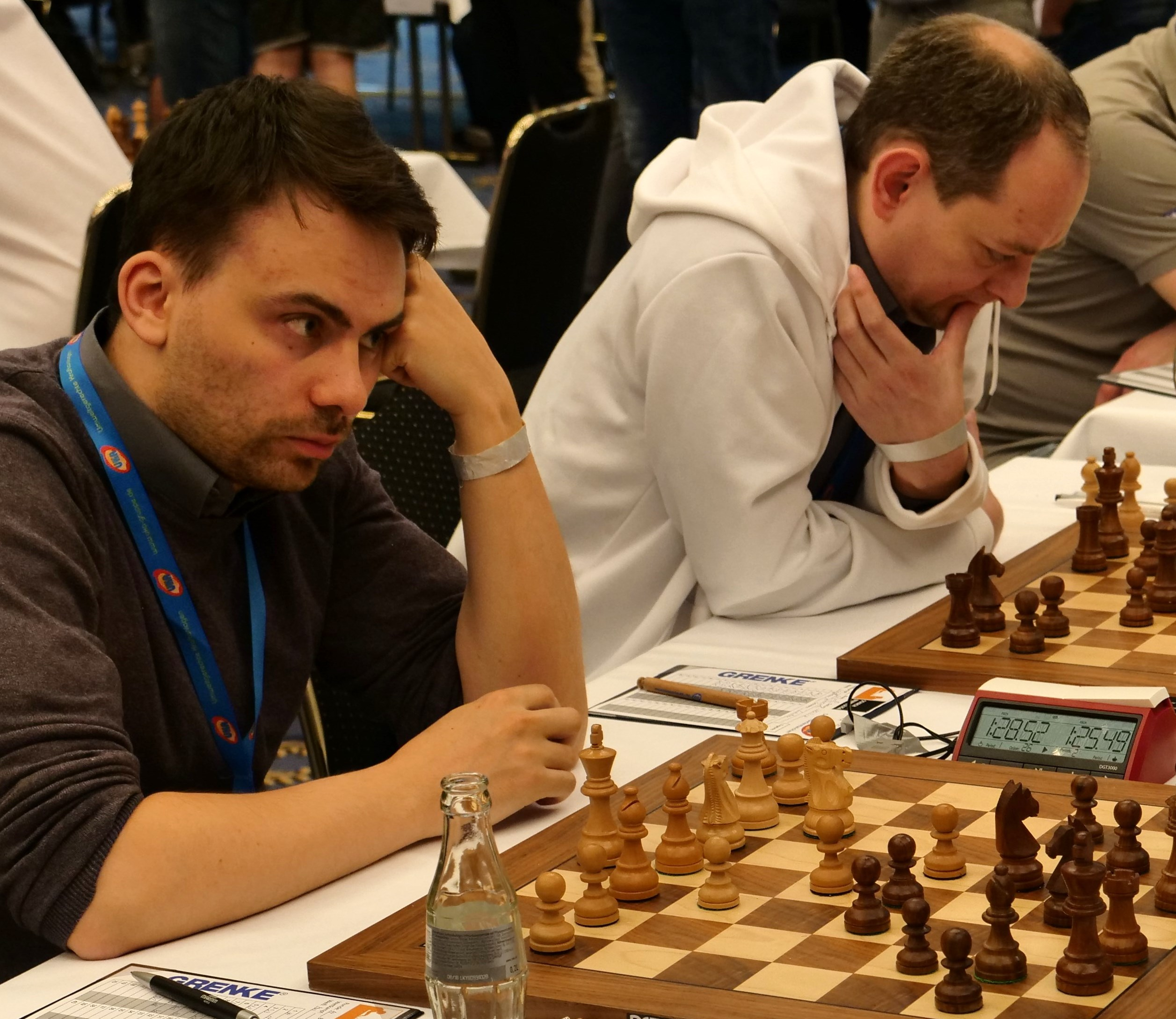 Abel und Lauber Bundesliga-Endrunde 30-4-2018